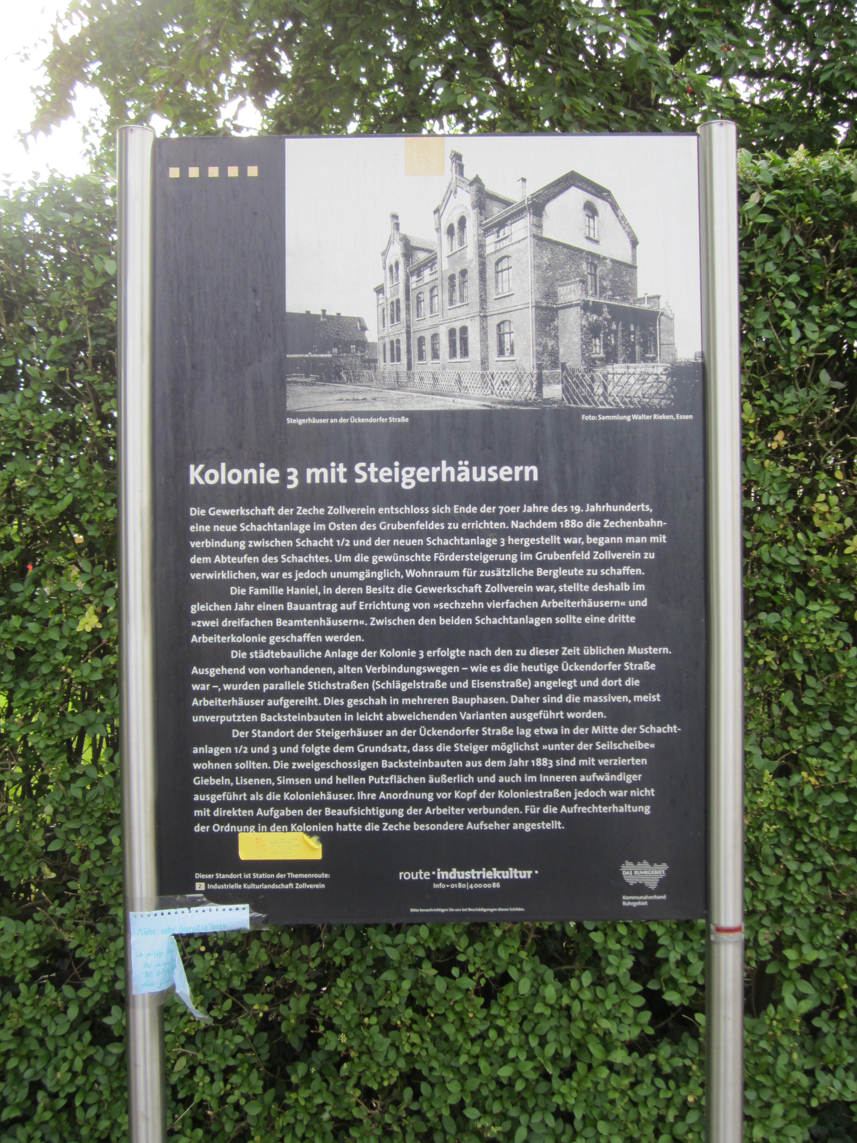 Kolonie Zollverein III in Essen-Katernberg; Informationstafel